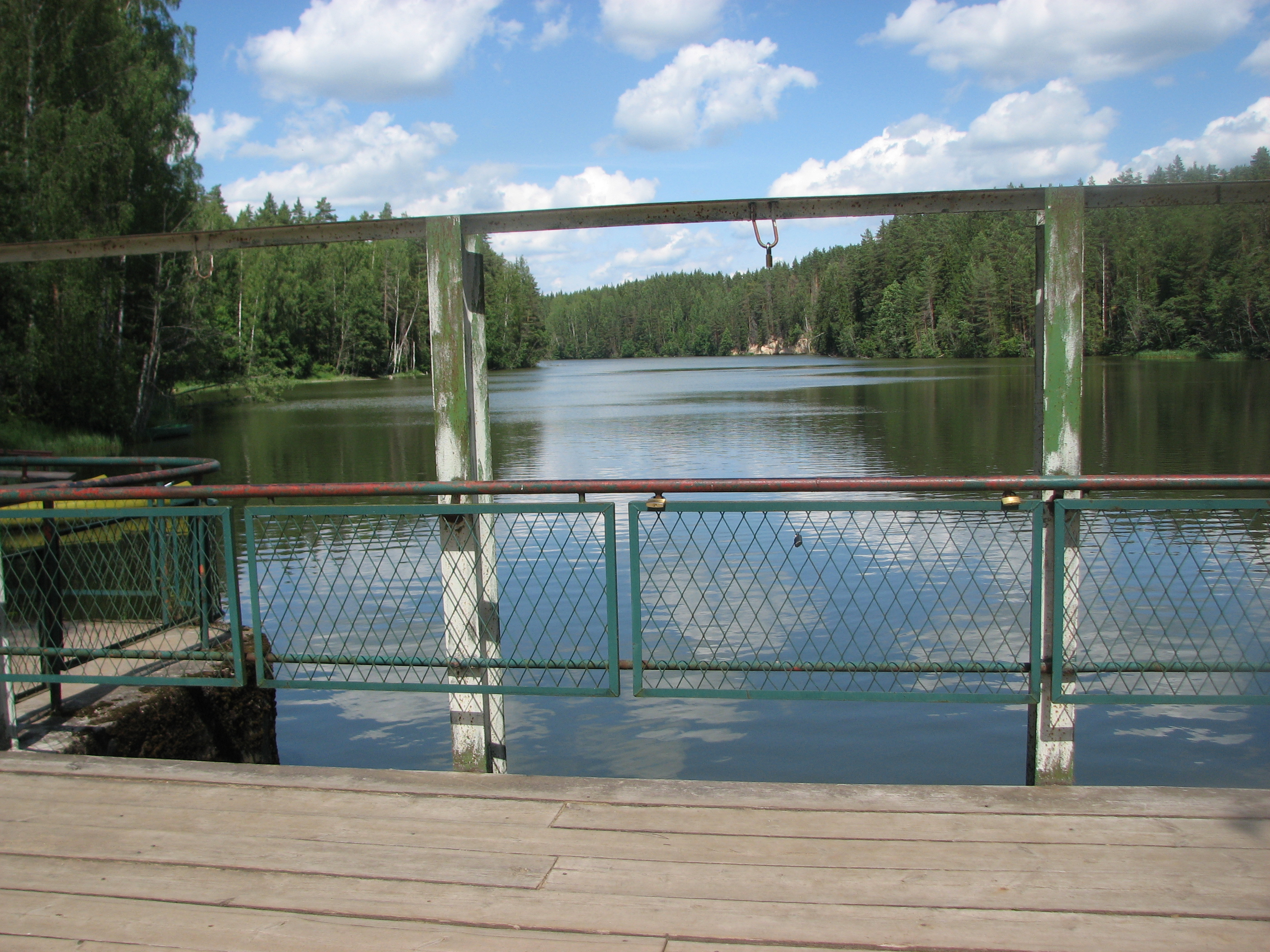 Saesaare paisjärv